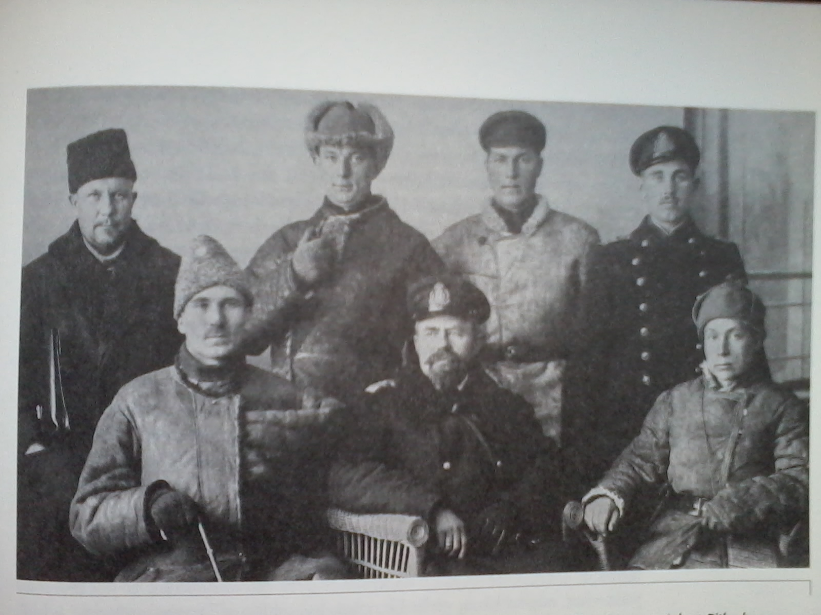 Vabadussõda. Soomusrongide divisjoni juhtkond koos Johan Pitkaga 1919. aasta kevad-talvel. Istuvad (vasakult): Tartus haiglaravil viibiv kapten Karl Parts, "soomusrongide isa" ja Eesti Merejõudude juhataja Johan Pitka, Soomusrongide divisjoni ülema kohuseid täitev kapten Anton Irv. Seisavad vasakult: Soomusrongide divisjoni liikumis osakonna ülem Julius Trubock, Soomusrongide divisjoni indendant Mihkel Piperal, kapten Karl Partsi adjutant leitnant Johannes Eisenberg, Merejõudude juhataja Johan Pitka adjutant mereväe vanemleitnant Karl Mitt.